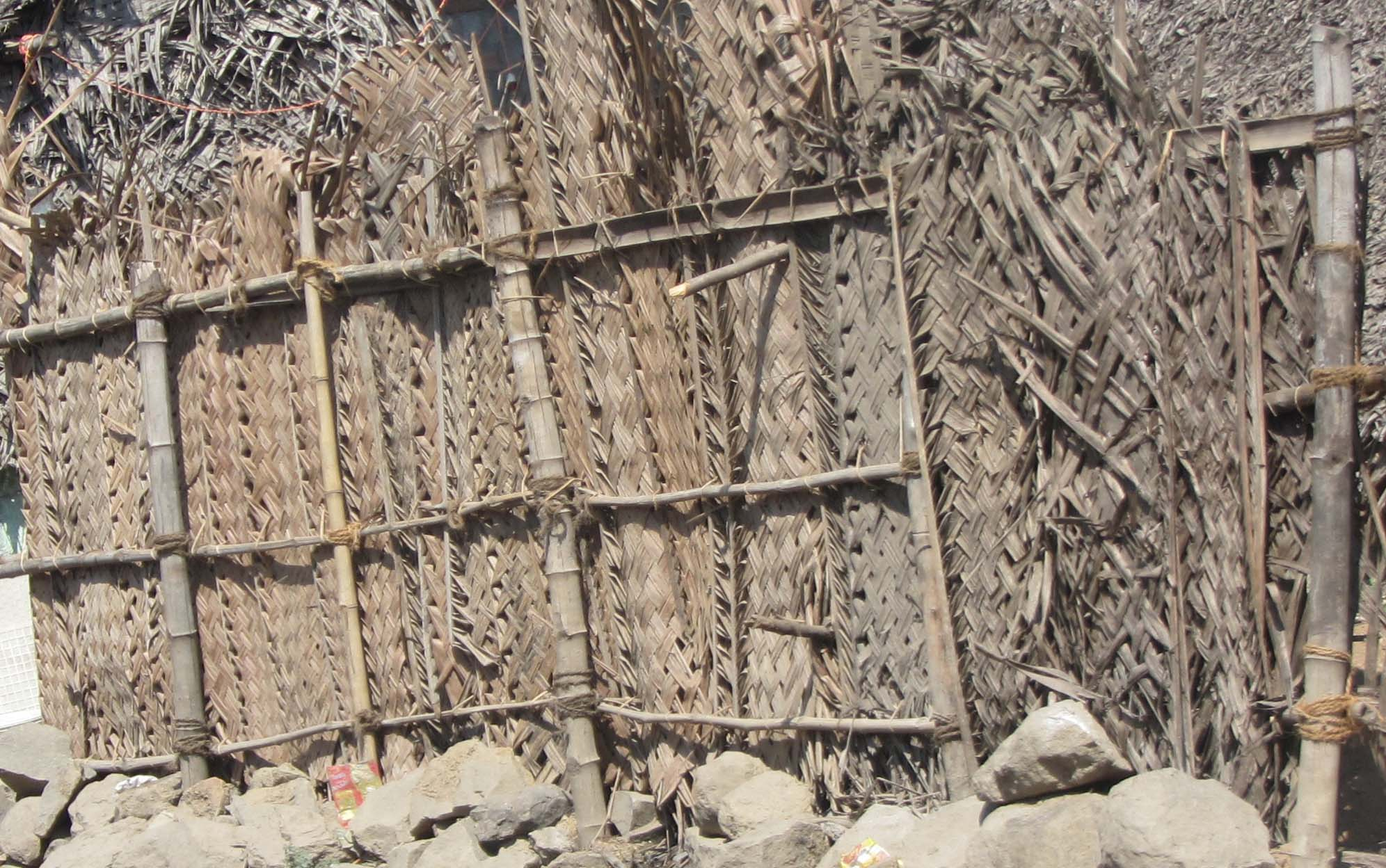 கீற்று வேலி. வீட்டுக்கு வேலி. புழங்கும் பகுதிக்கு மறைவிடம்.